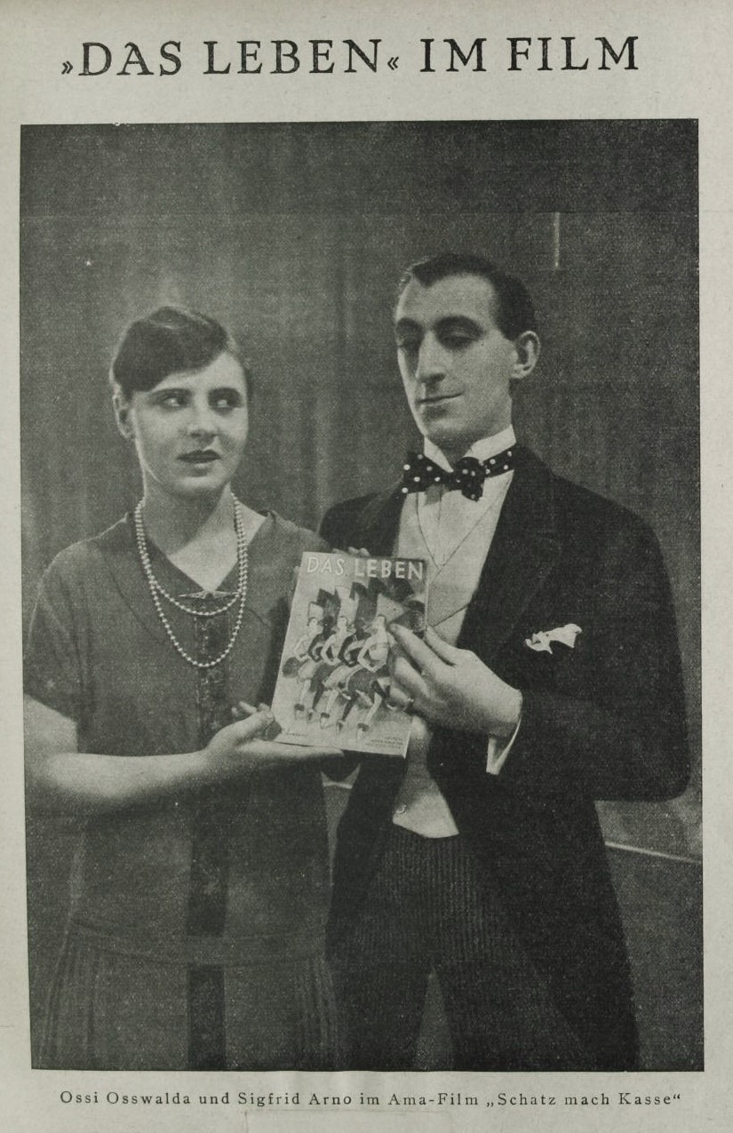 Das Leben im Film. Ossi Oswalda und Siegfried Arno im Ama-Film Schatz, mach' Kasse (1926)